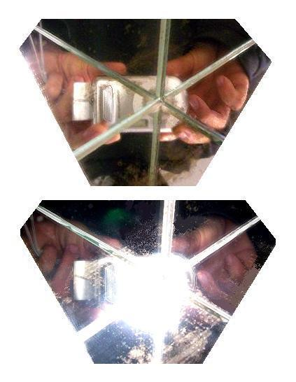 triple mirror retro reflector